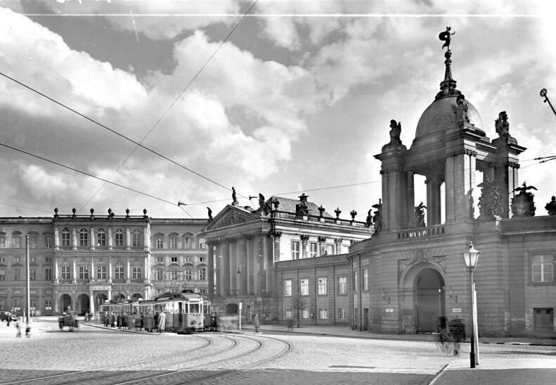 Potsdam.- Am Alten Markt, Fortuna-Portal und Palast Barberini